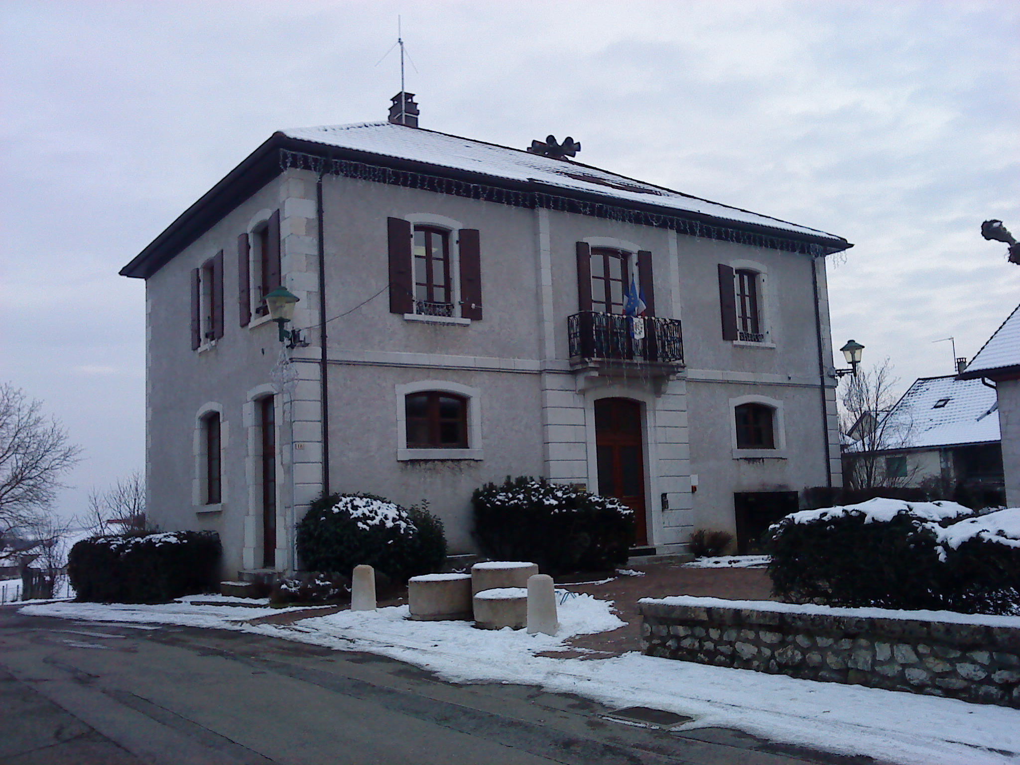 Mairie de Sergy (Ain, France)